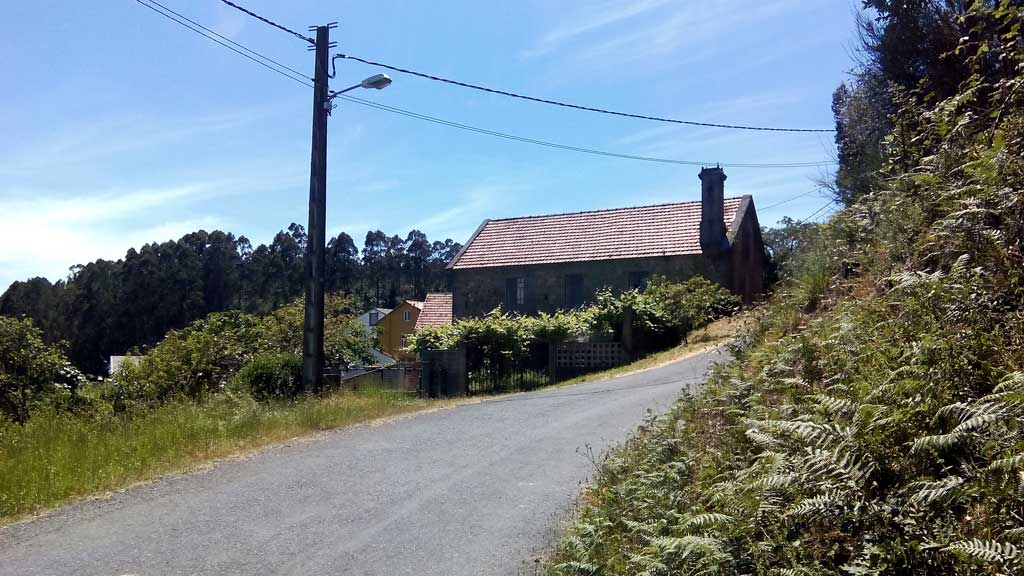 Vista de Fontela.